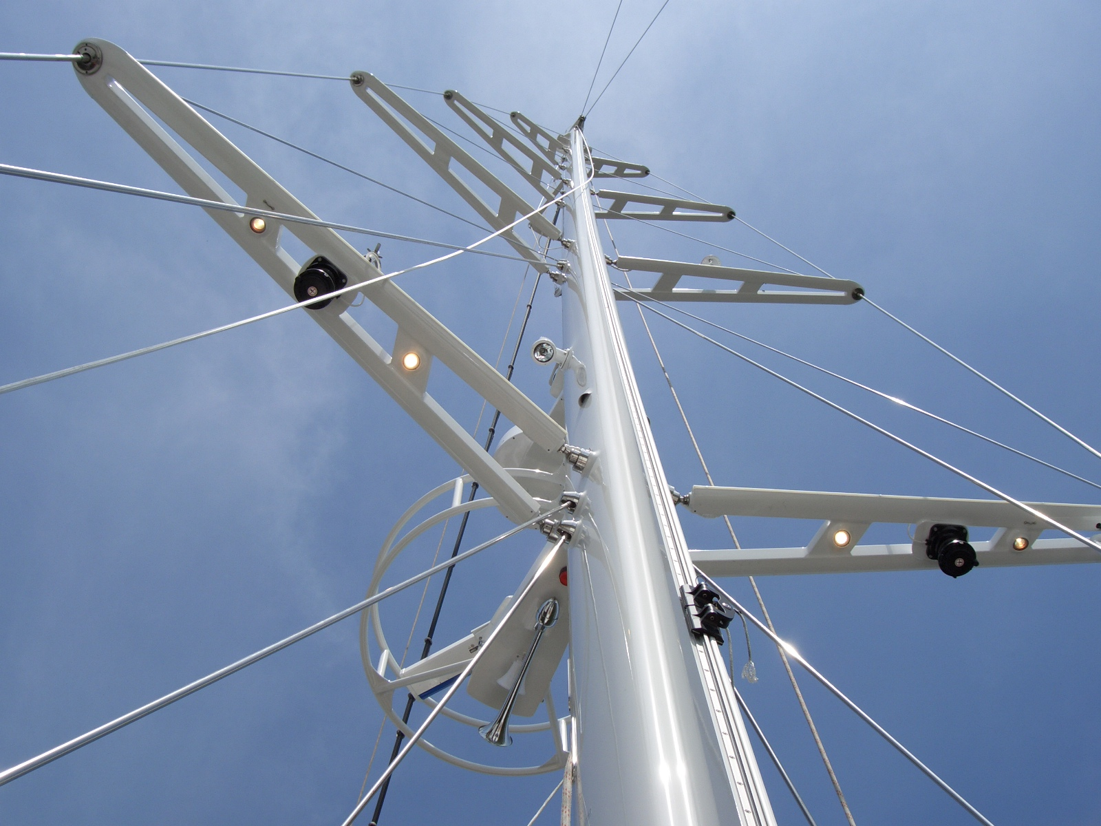 Mast mit Salinge